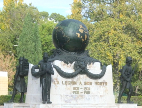 Monument aux morts de la Légion étrangère